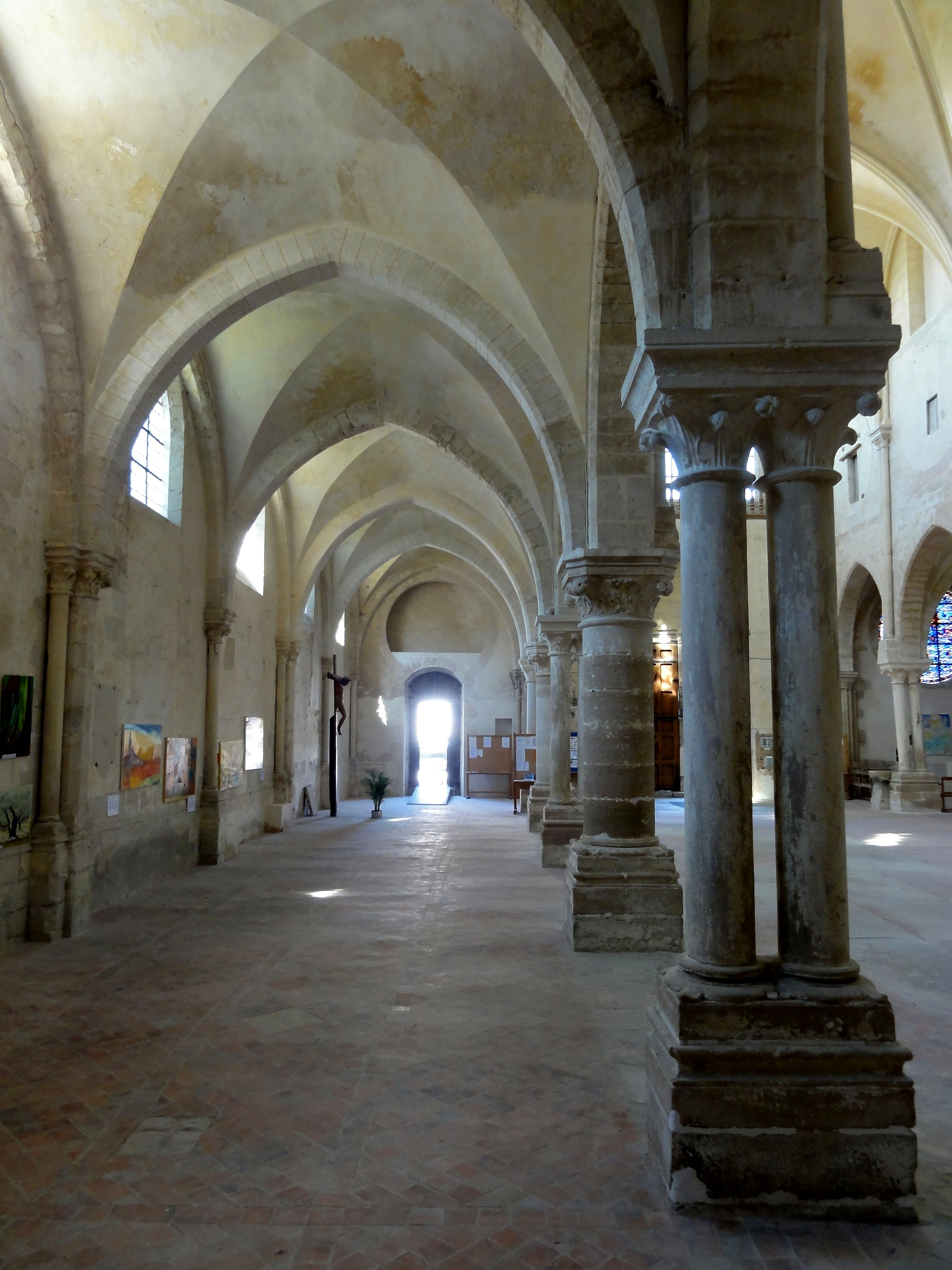 Bas-côté sud, vue vers l'est.